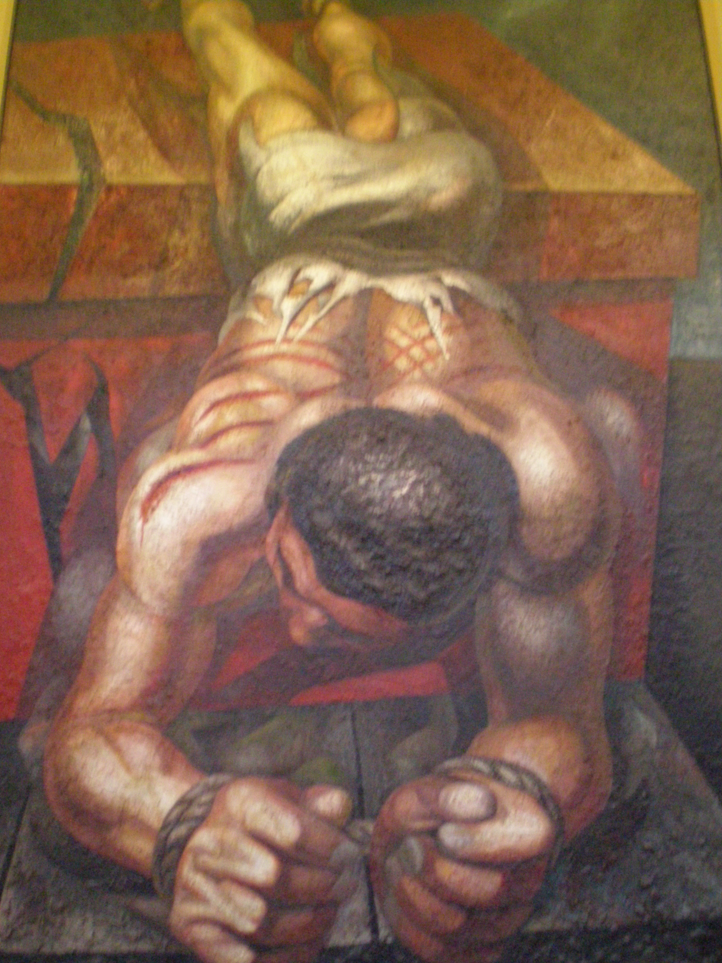 Détail d'une fresque de Siqueiros au Palacio de Bellas Artes, à Mexico.